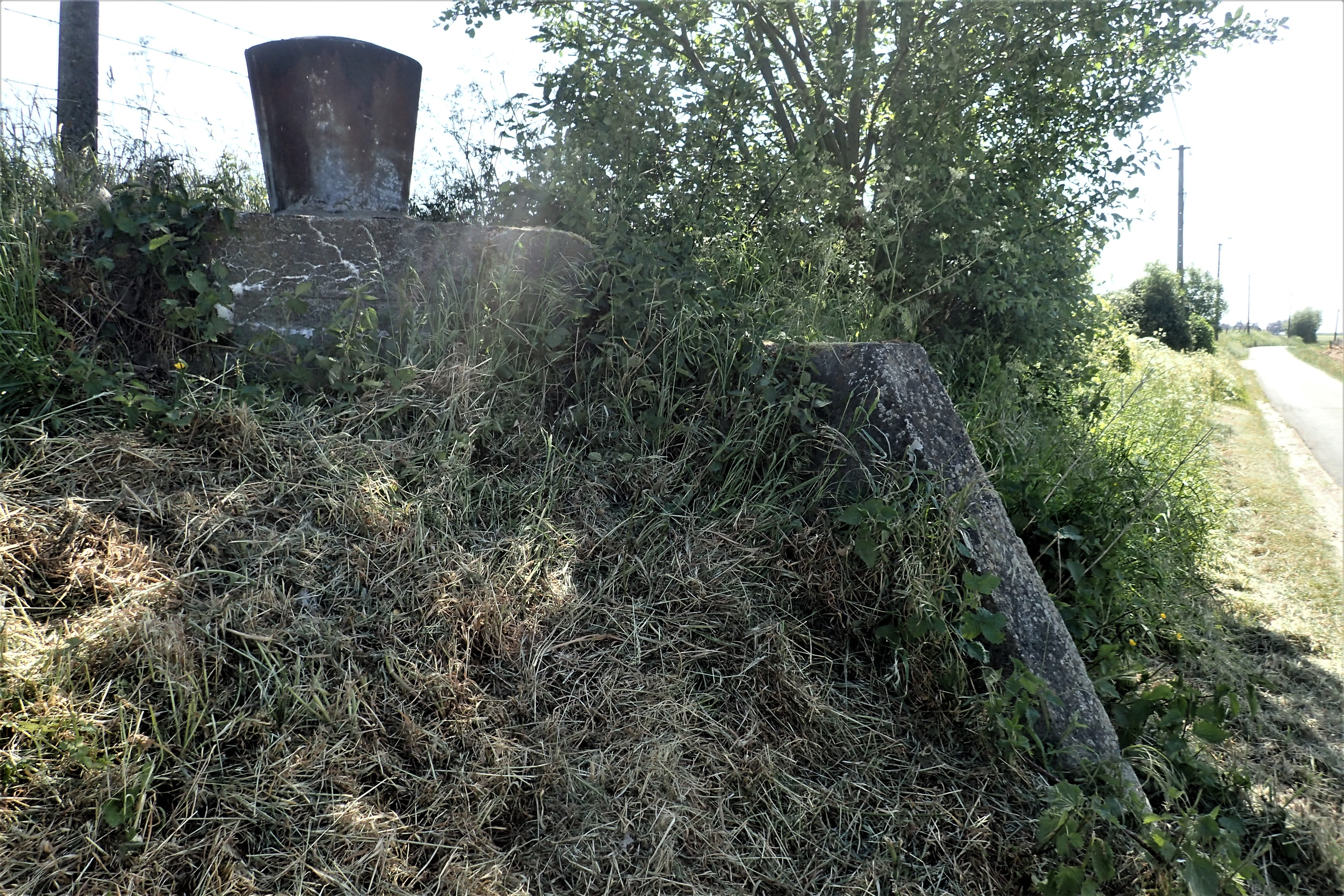 ankerpaal in Pepingen, onderdeel van de verdedigingslinie Ninove-Waver